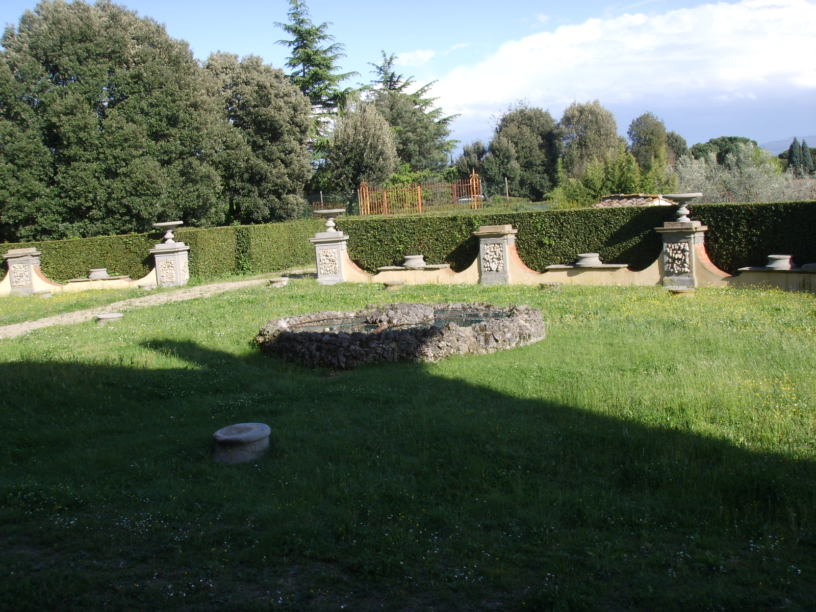 Villa Corsini, giardino, rotonda